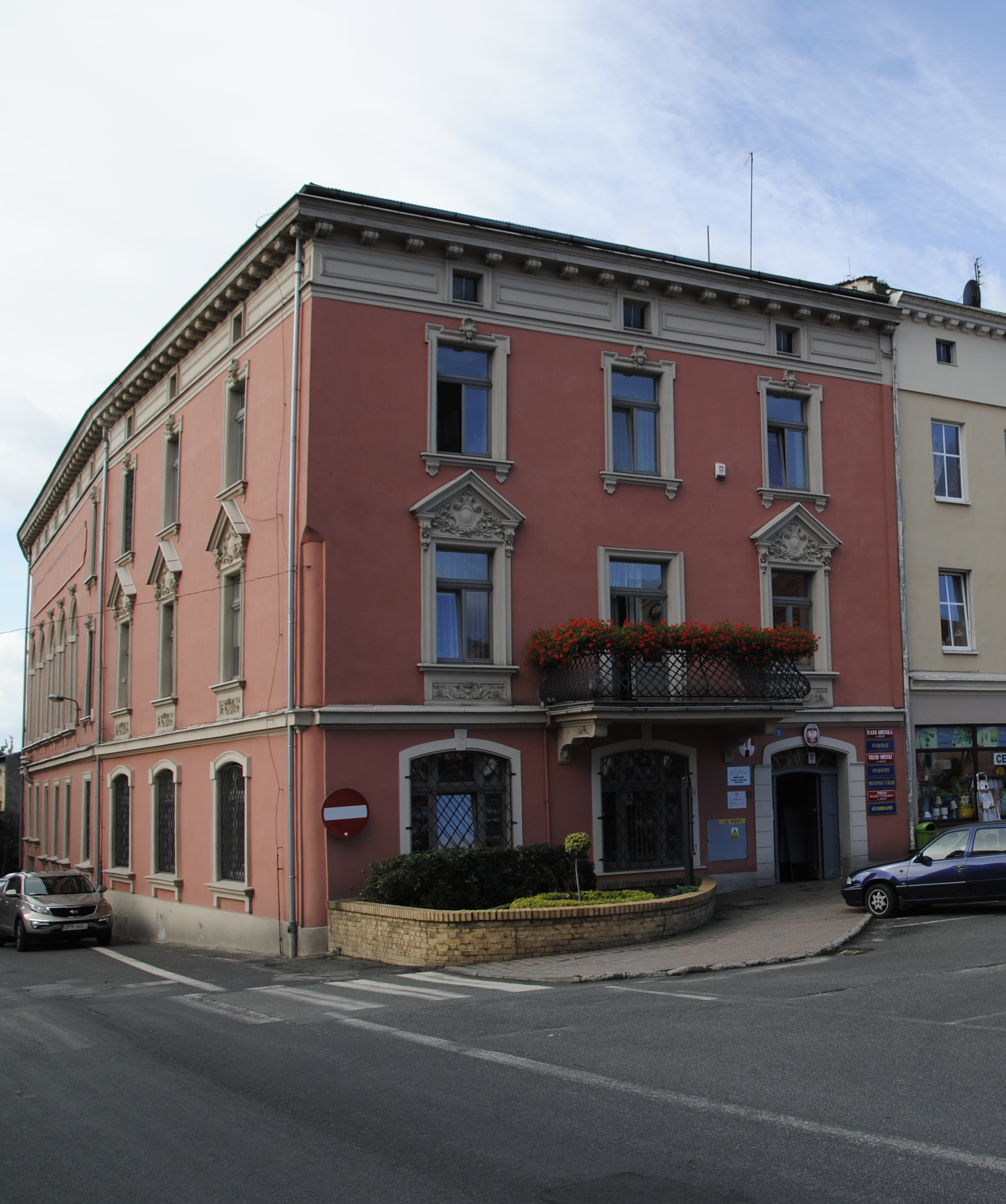 Ring in Zülz (Oberschlesien), Rathaus